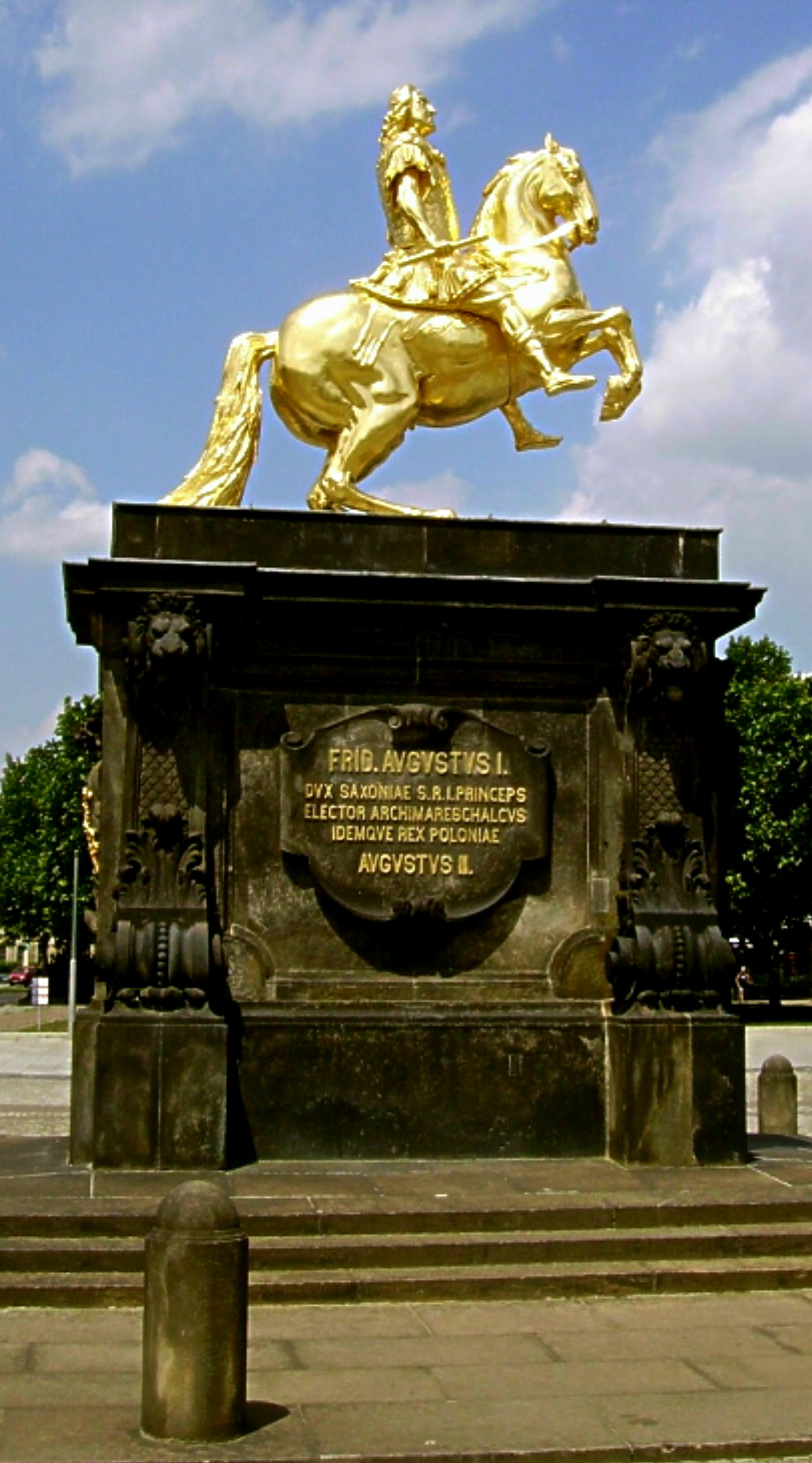 Jean Joseph Vinache - 1733 „Goldener Reiter“ – Reiterdenkmal von August dem Starken in Dresden-Neustadt, 1945 stark beschädigt und 1956 vom Bildhauer Walther Flemming restauriert.